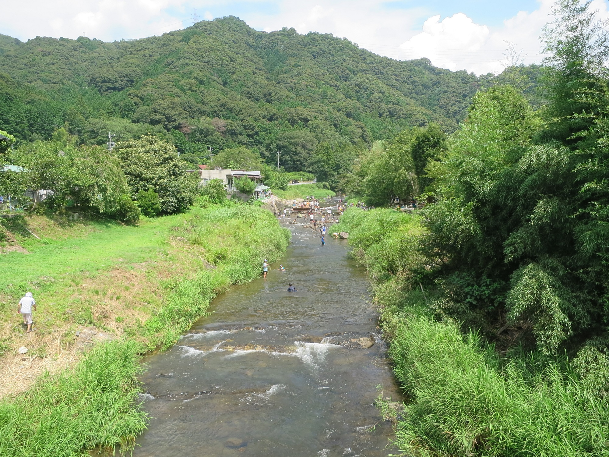 愛知県岡崎市淡渕町の男川やな